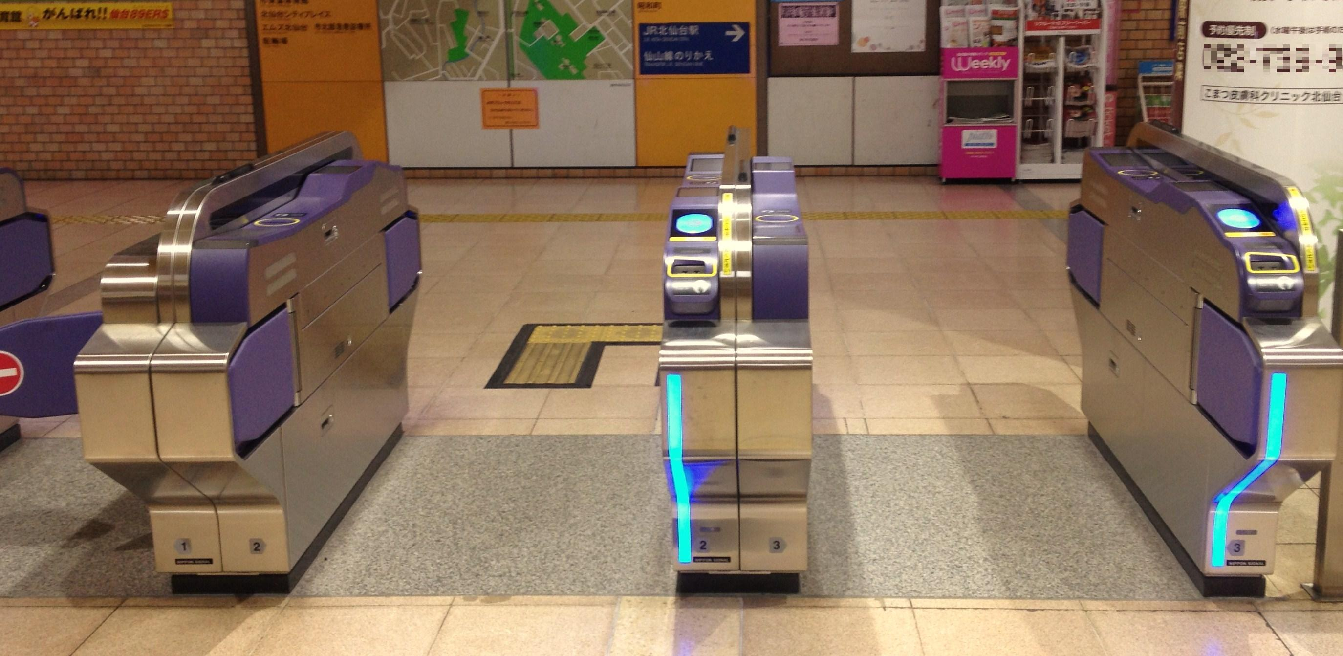 icscaに対応した自動改札機（北仙台駅）